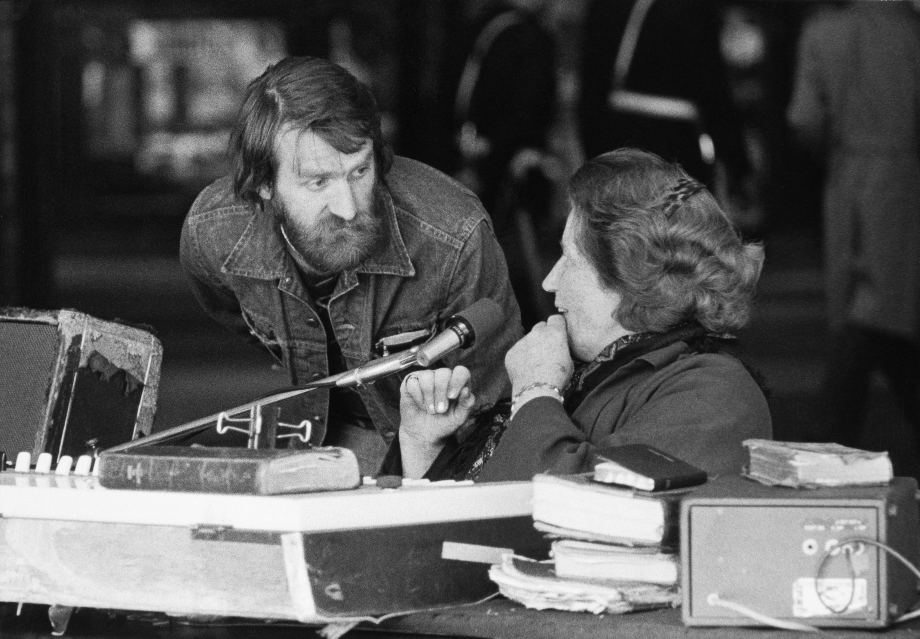 Marias enmansorkester, under Sergels Torg i Sergelarkaden. Maria Johansson (1918-2002) spelade från 1972 dagligen på sin elorgel och sjöng religiösa sånger vid Sergels Torg.